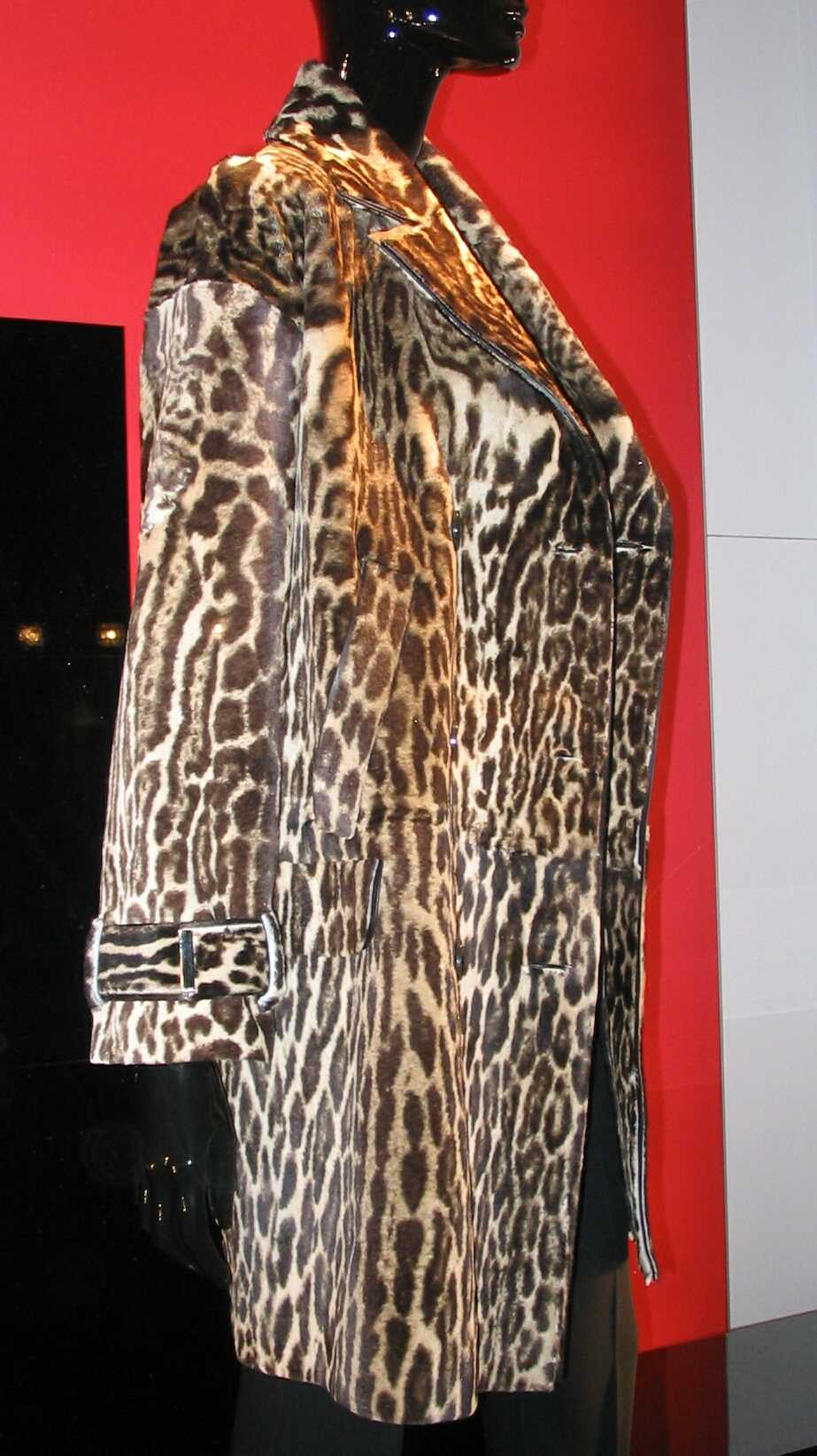 Mantel aus Wallabyfell mit Ozelotmuster bedruckt. Gesehen Eickhoff, Königsallee, Düsseldorf, 2010.